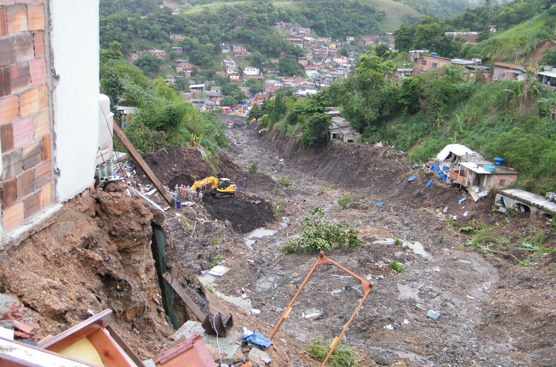 Vista do Morro do Bumba, onde casas à beira da cratera ainda ameaçam desabar. Niterói-RJ